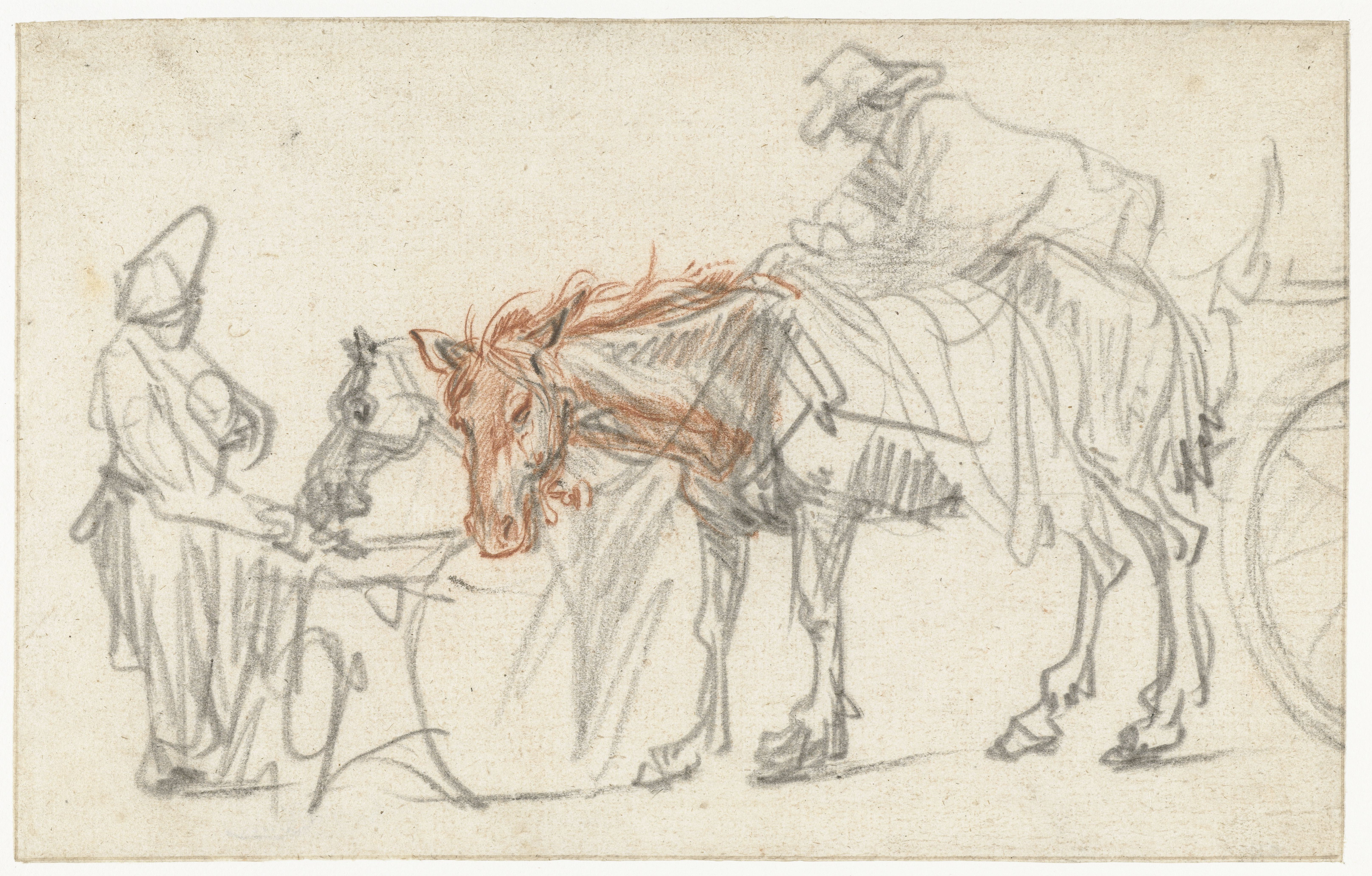 IdentificatieTitel(s): Twee paarden bij een halteplaatsObjecttype: tekening Objectnummer: RP-T-1961-77Catalogusreferentie: Schatborn 16VervaardigingVervaardiger: tekenaar: Rembrandt van RijnPlaats vervaardiging: AmsterdamDatering: ca. 1637Fysieke kenmerken: zwart en rood krijt; kaderlijnen in bruine inkt over zwart krijtMateriaal: papier krijt Afmetingen: h 173 mm × b 273 mmToelichtingMarijn Schapelhouman, Rembrandt en de kunst van het tekenen, Zwolle/Amsterdam 2006, p. 54, kleurafb. 47OnderwerpWat: horseVerwerving en rechtenCredit line: Legaat van de heer en mevrouw De Bruijn-van der Leeuw, Muri, ZwitserlandVerwerving: legaat 1961Copyright: Publiek domein